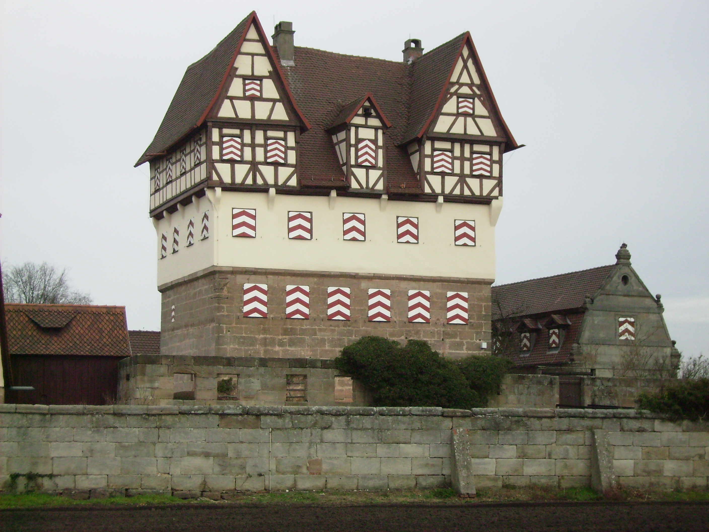 Schloss Neunhof, Landsitz einer Nürnberger Patrizierfamilie